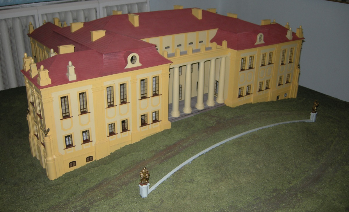 Макет палацу Любомирських у Рівному. Рівненський обласний краєзнавчий музей.